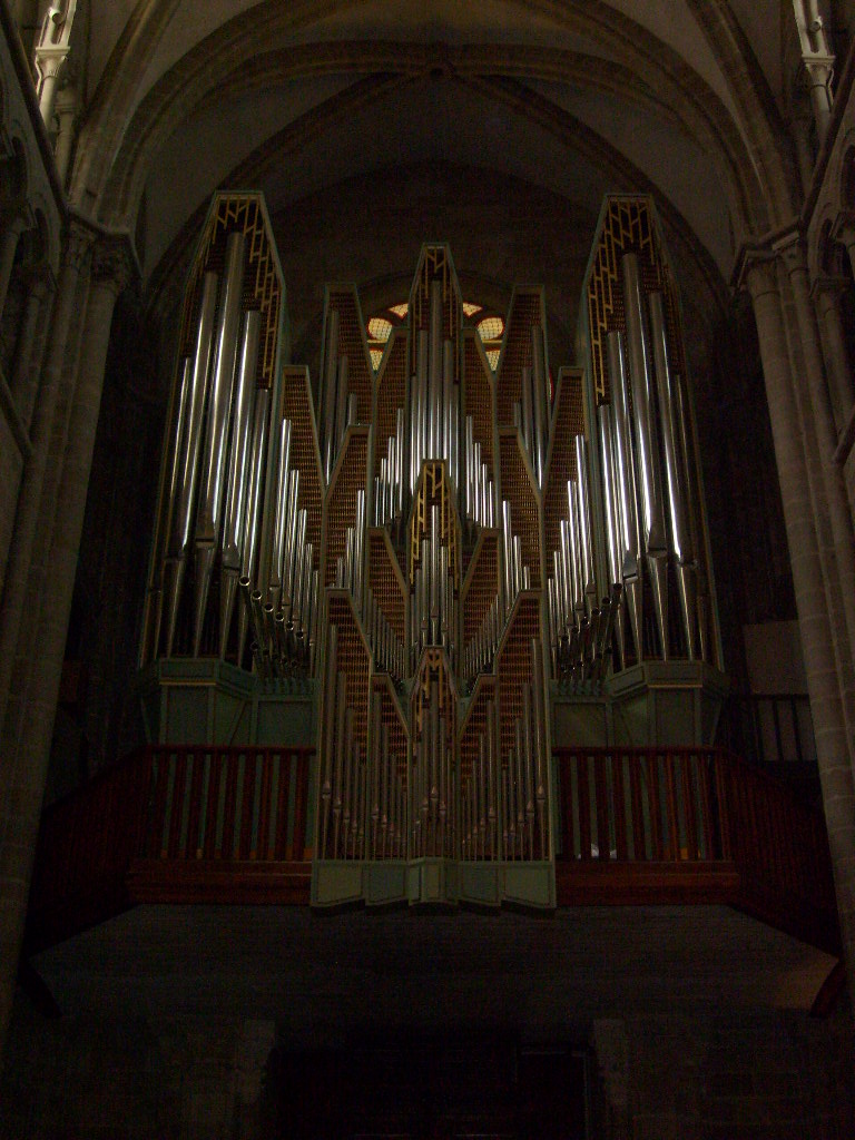 Orgue principal de la cathédrale Saint-Pierre de Genève (Suisse)